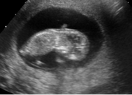 Embryon de 11 semaines.Embryo at 11 weeks.